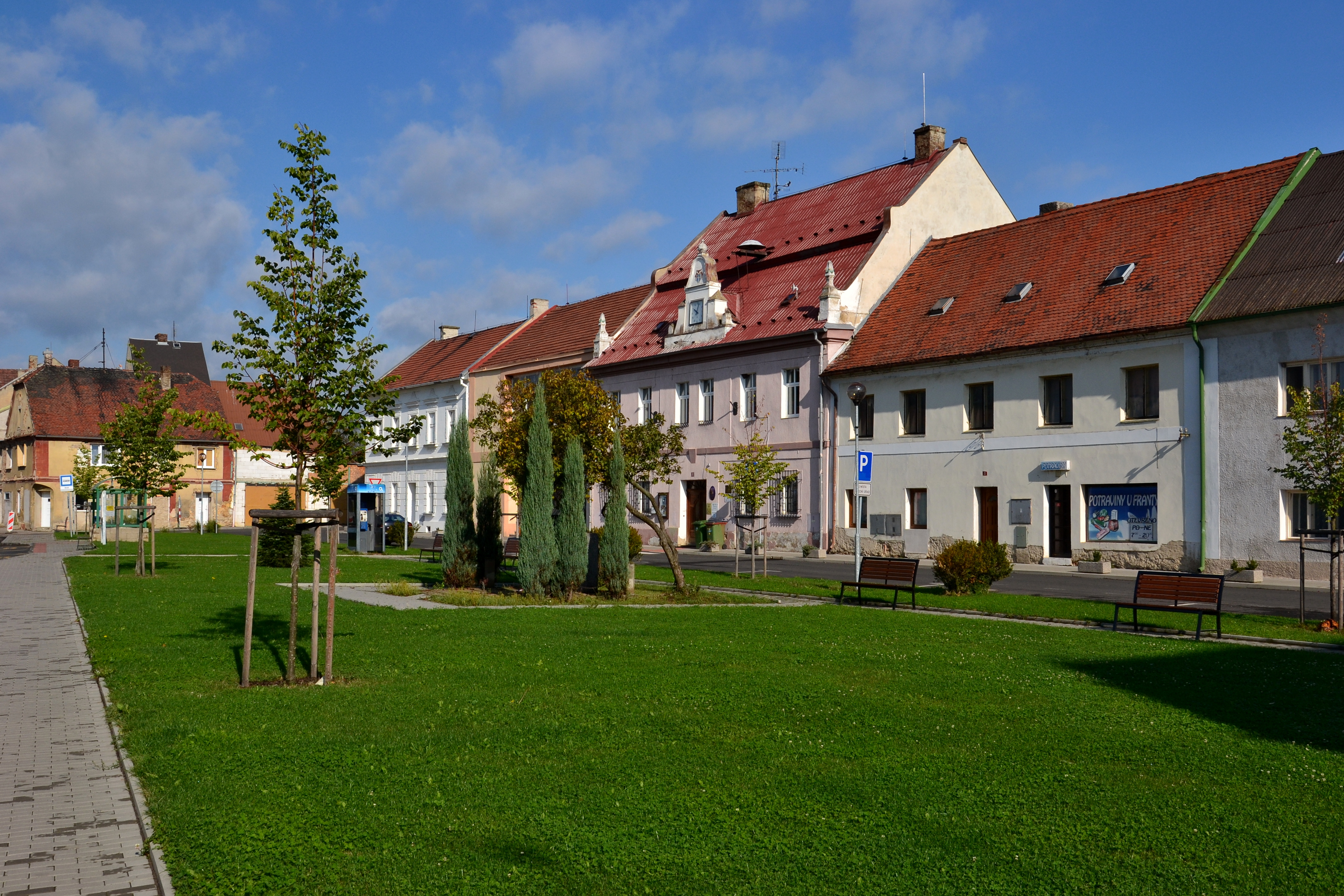 Údlice - domy na severní straně náměstí